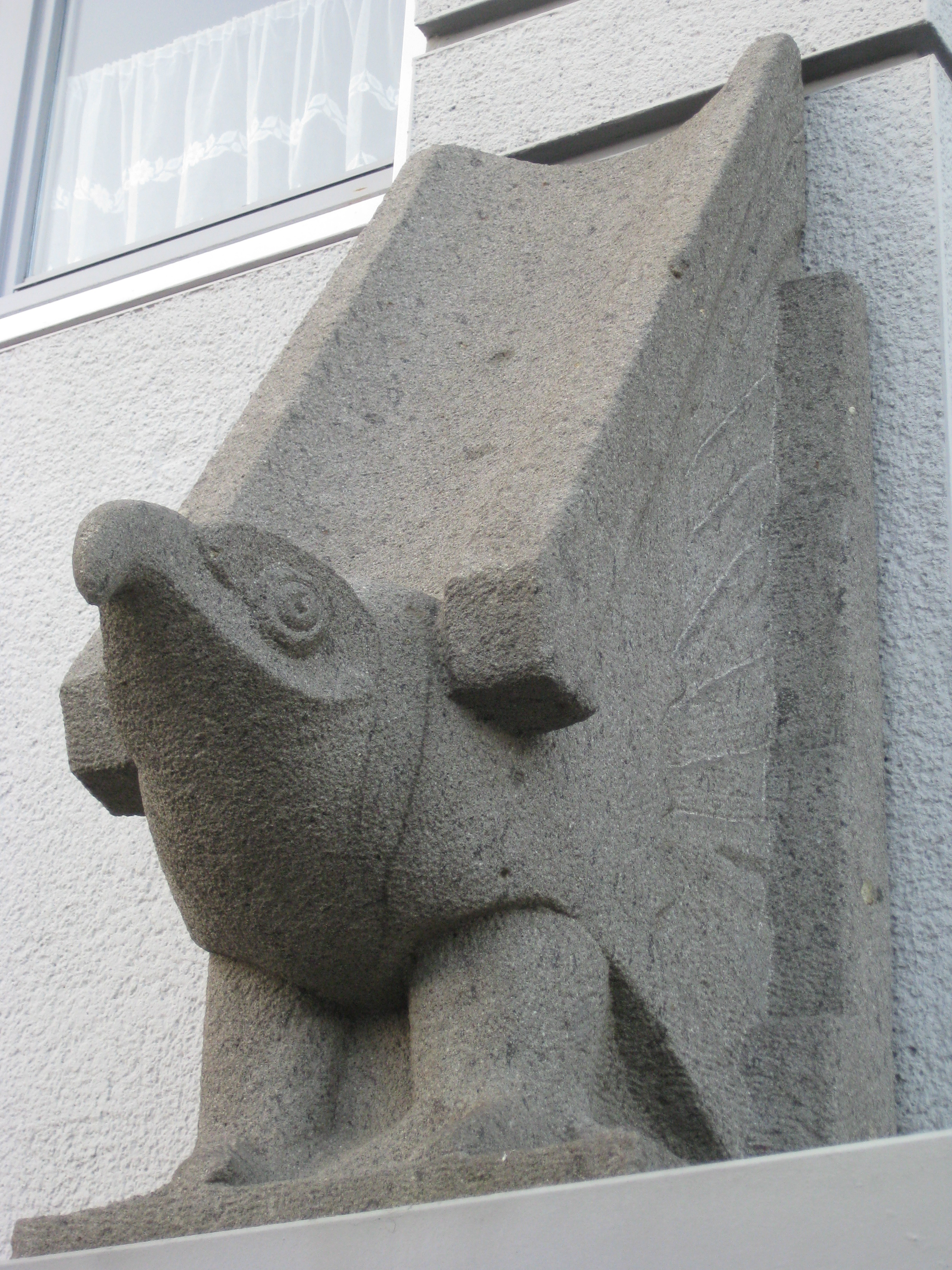 Adelaar in de Veeteeltstraat in Amsterdam-Oost (Betondorp)